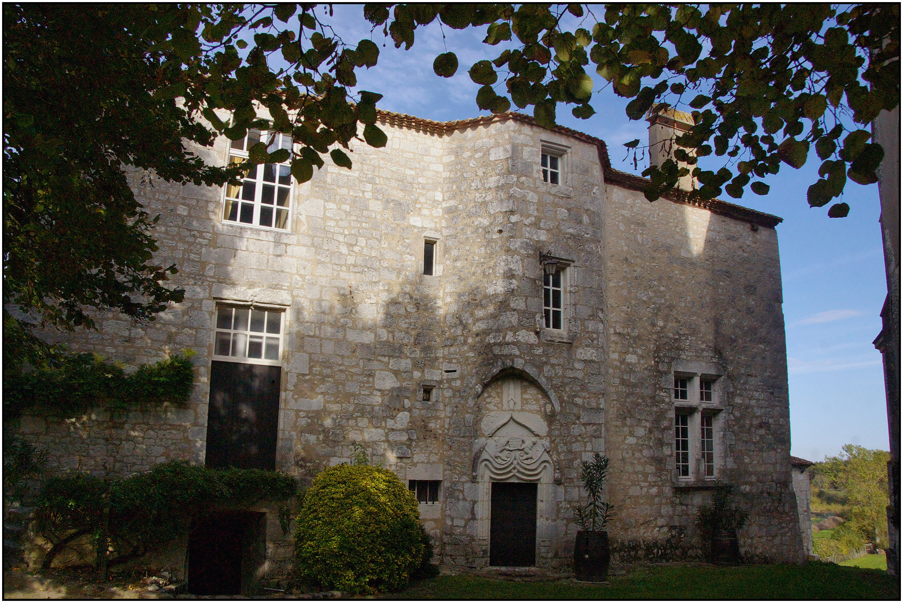 Presbytère de Bouniagues